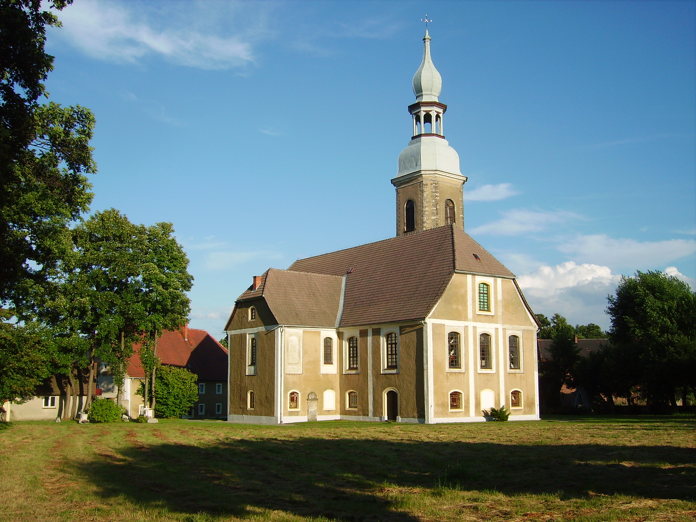 Wykroty - rzymskokatolicki kościół filialny p.w.śś Michała i Anny, XV, XVIII